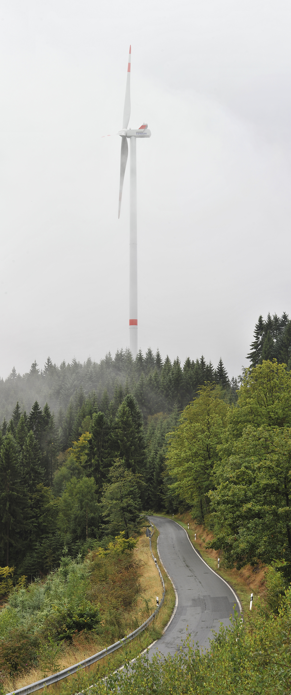 15. Station seiner Zukunftsenergientour: Windpark-Eröffnung in Bad Laasphe Auf der 15. Station seiner Zukunftsenergientour eröffnete NRW-Klimaschutzminister Johannes Remmel heute (11. September 2013) mit einer Delegation der EnergieAgentur.NRW den Windpark Hesselbach, der im Privatwald von Ludwig Prinz zu Sayn-Wittgenstein-Berleburg entsteht. Die sechs Windkraftanlagen mit einer Leistung von insgesamt 18 MW wurden von der wittgenstein new energy holding GmbH finanziert, geplant und umgesetzt. Der Park könnte den jährlichen Strombedarf der Stadt Bad Laasphe (14.000 Einwohner) vollständig decken.Das Beispiel zeigt: Moderne Windenergieanlagen können wirtschaftlich in Wäldern betrieben werden, weil sie mit einer Nabenhöhe von 140 Metern die windreichen und turbulenzarmen Zonen über den Wipfeln technisch nutzbar machen. Flickr tags: NRW; 2013; Klimaschutztour; Bad Laasphe; wittgenstein new energy holding GmbH; Windkraft; Windpark; erneuerbare Energien